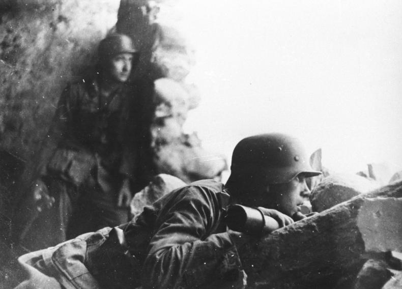 Junge Volksgrenadiere an der Adriafront. Ein feindliches MG-Nest ist entdeckt worden und wird unter Feuer genommen. PK. Feder Okt. 1944